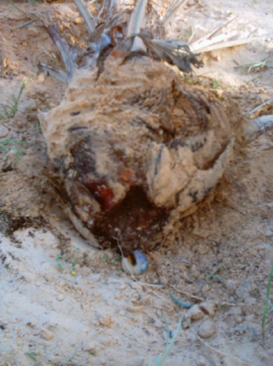 Offshoots attack and damage by Oryctes agamemnon larva